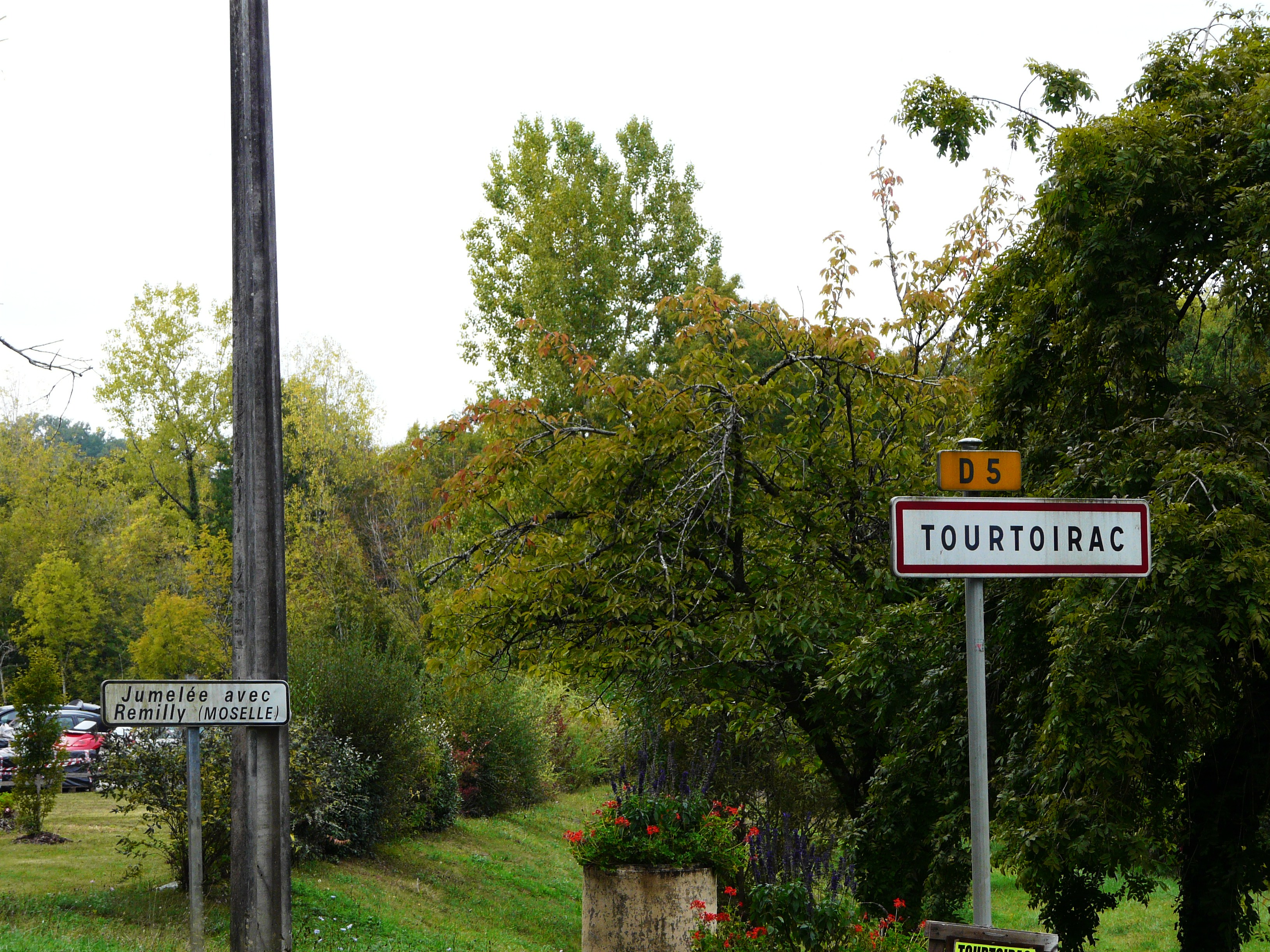 Panneau de jumelage de Tourtoirac, Dordogne, France.